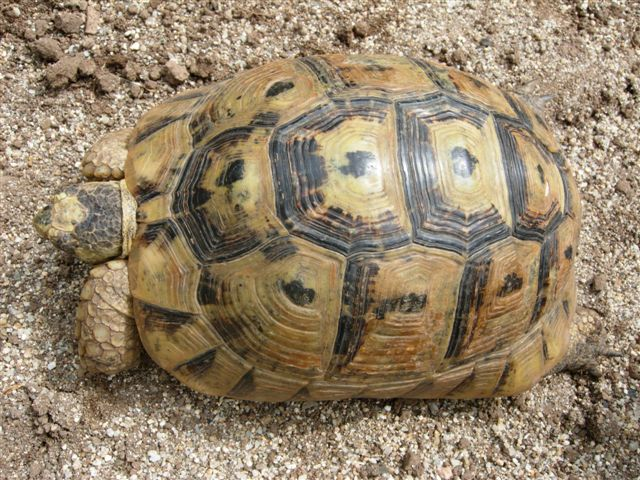 Testudo graeca nabeulensis varietà 'Sarda', Sardegna, Italia